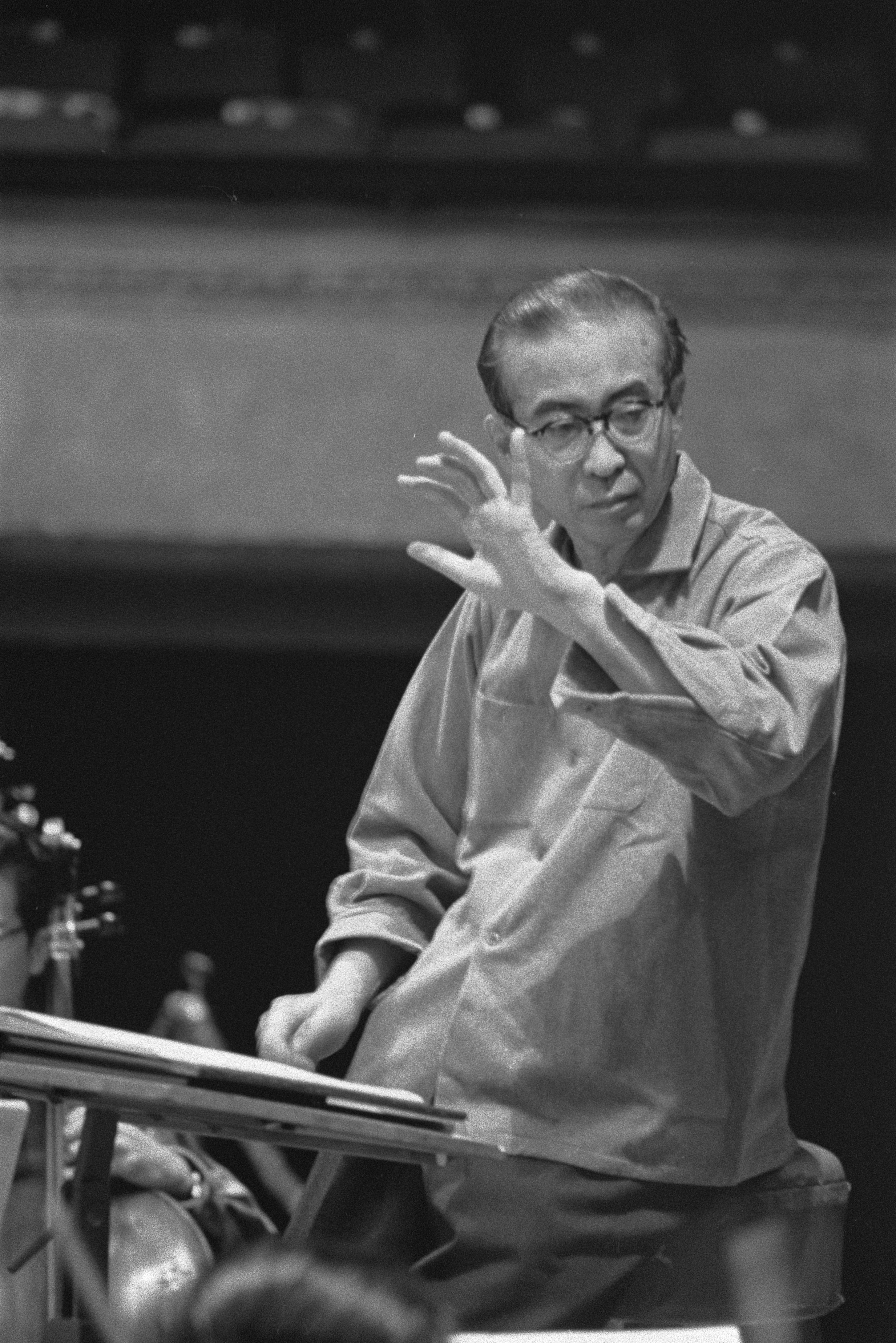 Collectie / Archief : Fotocollectie Anefo Reportage / Serie : [ onbekend ] Beschrijving : Repetitie Tokyos Philharmonisch orkest te Den Haag , de dirigent Hidemaro Konoye tijdens de repetitie Datum : 3 november 1960 Locatie : Den Haag, Tokio Trefwoorden : dirigenten, orkesten, repetities Persoonsnaam : Hidemaro Konoye Fotograaf : Pot, Harry / Anefo Auteursrechthebbende : Nationaal Archief Materiaalsoort : Negatief (zwart/wit) Nummer archiefinventaris : bekijk toegang 2.24.01.05 Bestanddeelnummer : 911-7365